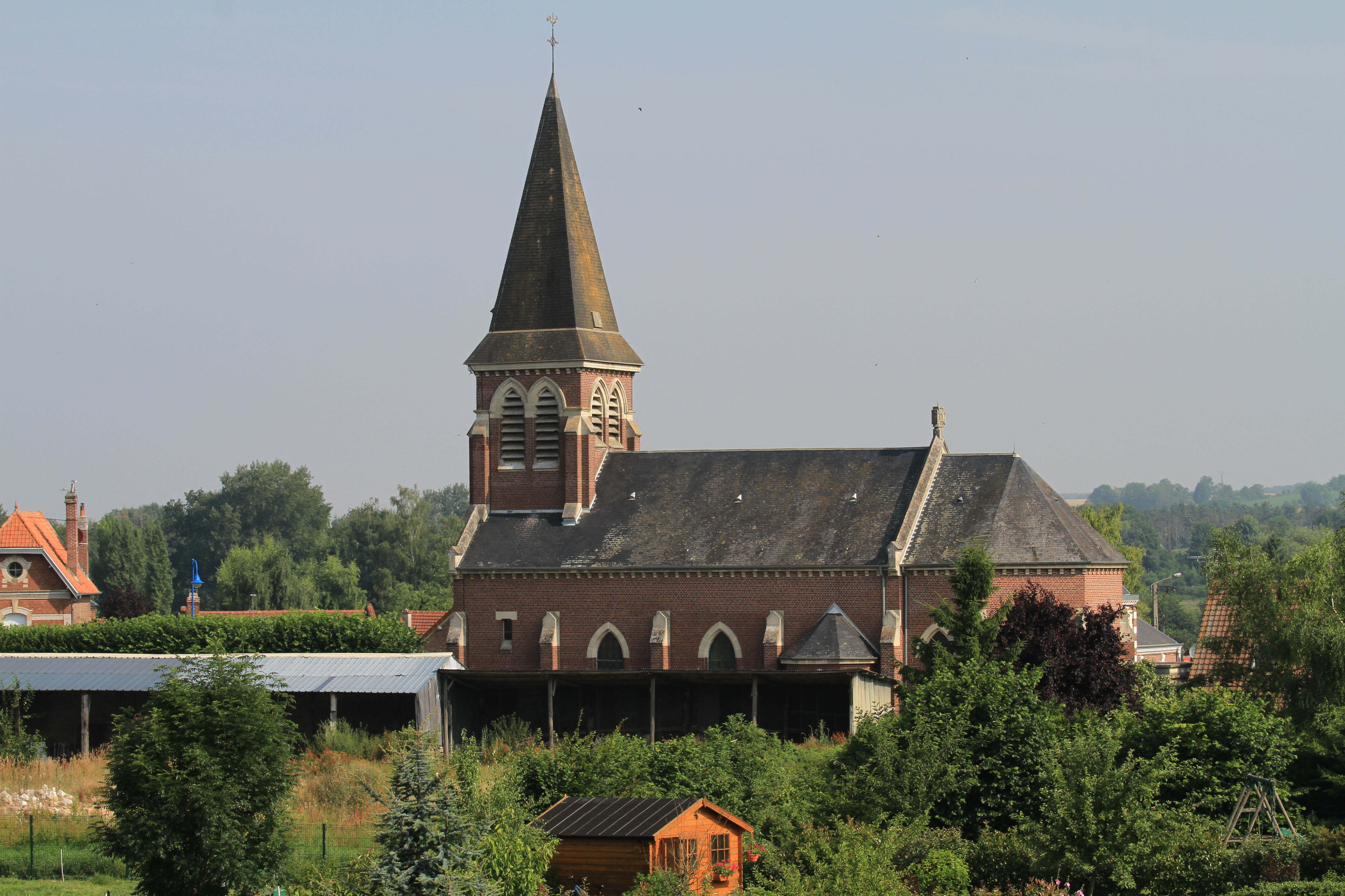 Eglise de Hailles